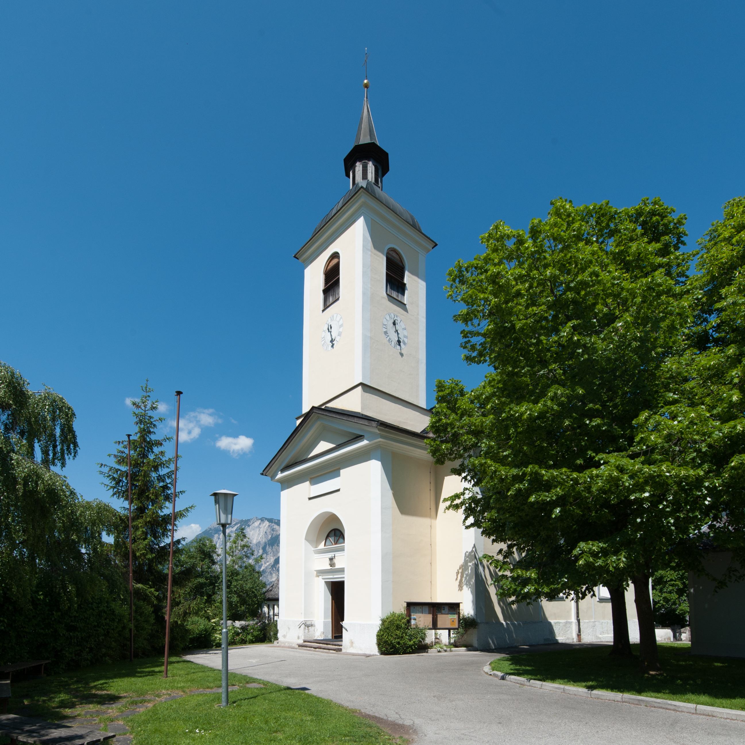 Wiki takes Nordtiroler Oberland: Kirche Mariae Heimsuchung in Haimingerberg